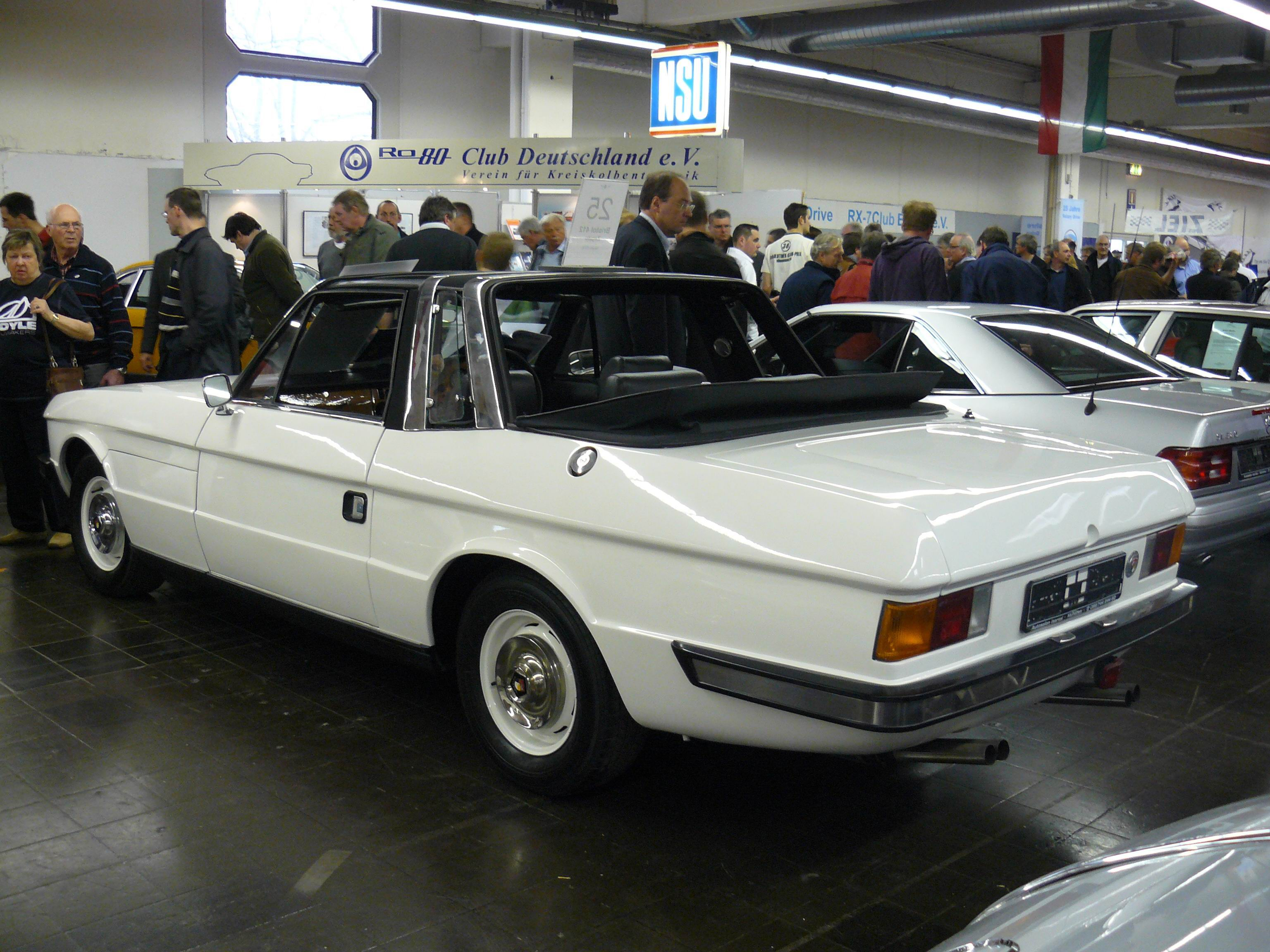 Essen 2011